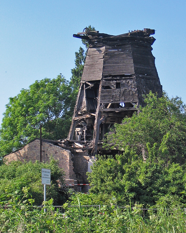 Beschreibung: Mahnkesche Mühle in Stralsund Fotograf: Darkone, 15. Juni 2005